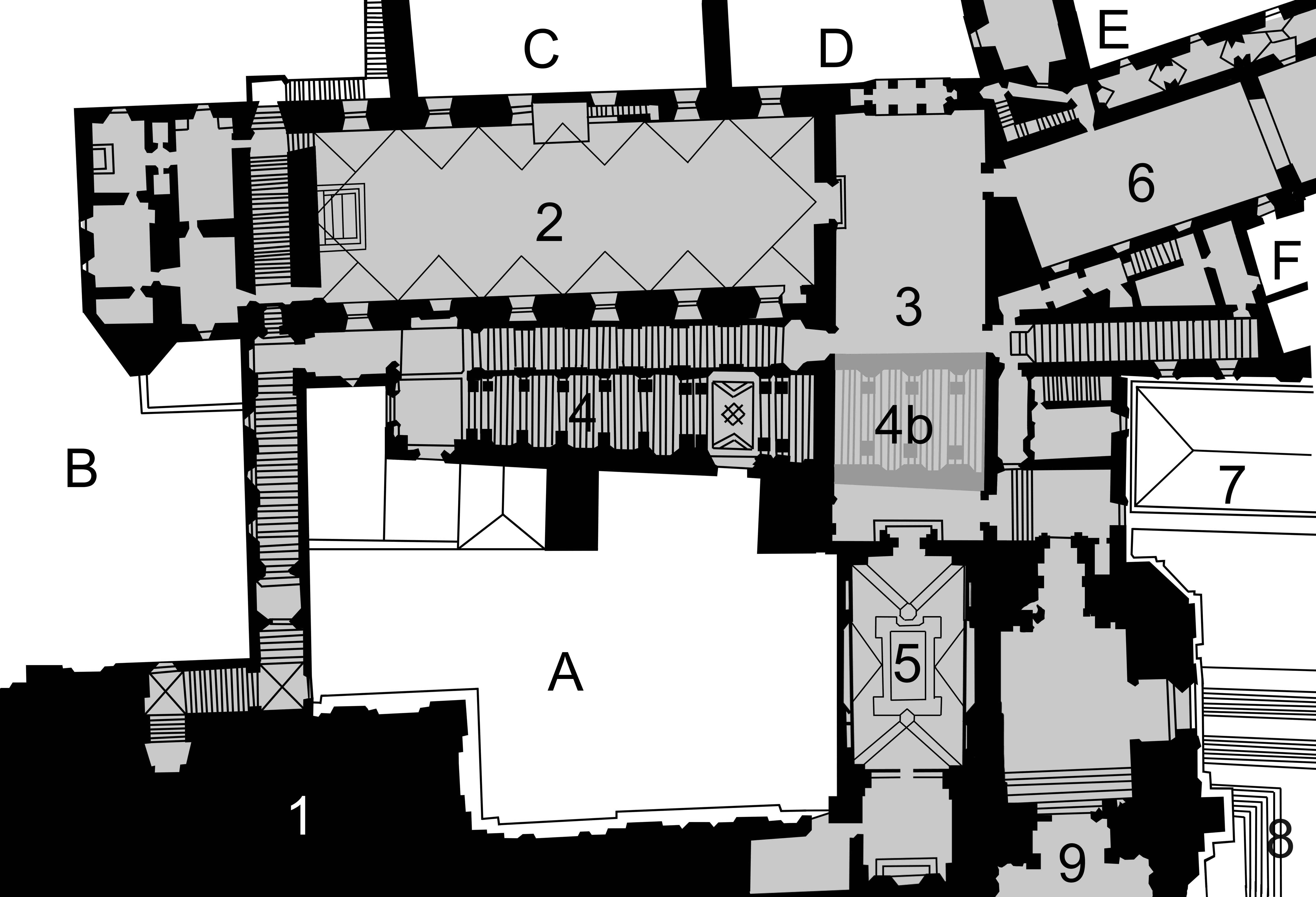 Schematischer Grundriss der Sixtinischen Kapelle mit nebenliegenden Räumen: 1 Petersdom 2 Sixtinische Kapelle 3 Sala Regia (Königssaal) 4 Scala Regia 4b Scala Regia (Teil unterhalb der Sala Regia) 5 Cappella Paolina 6 Sala Ducale (Herzogssaal) 7 nördlicher Arm der Kolonnaden 8 Petersplatz 9 Benediktions-Aula (mit der Benediktionsloggia) A ? B Piazza del Forno C Cortile della Sentinella D Cortile Borgia E Cortile del Pappagallo F Cortile del Maresciallo